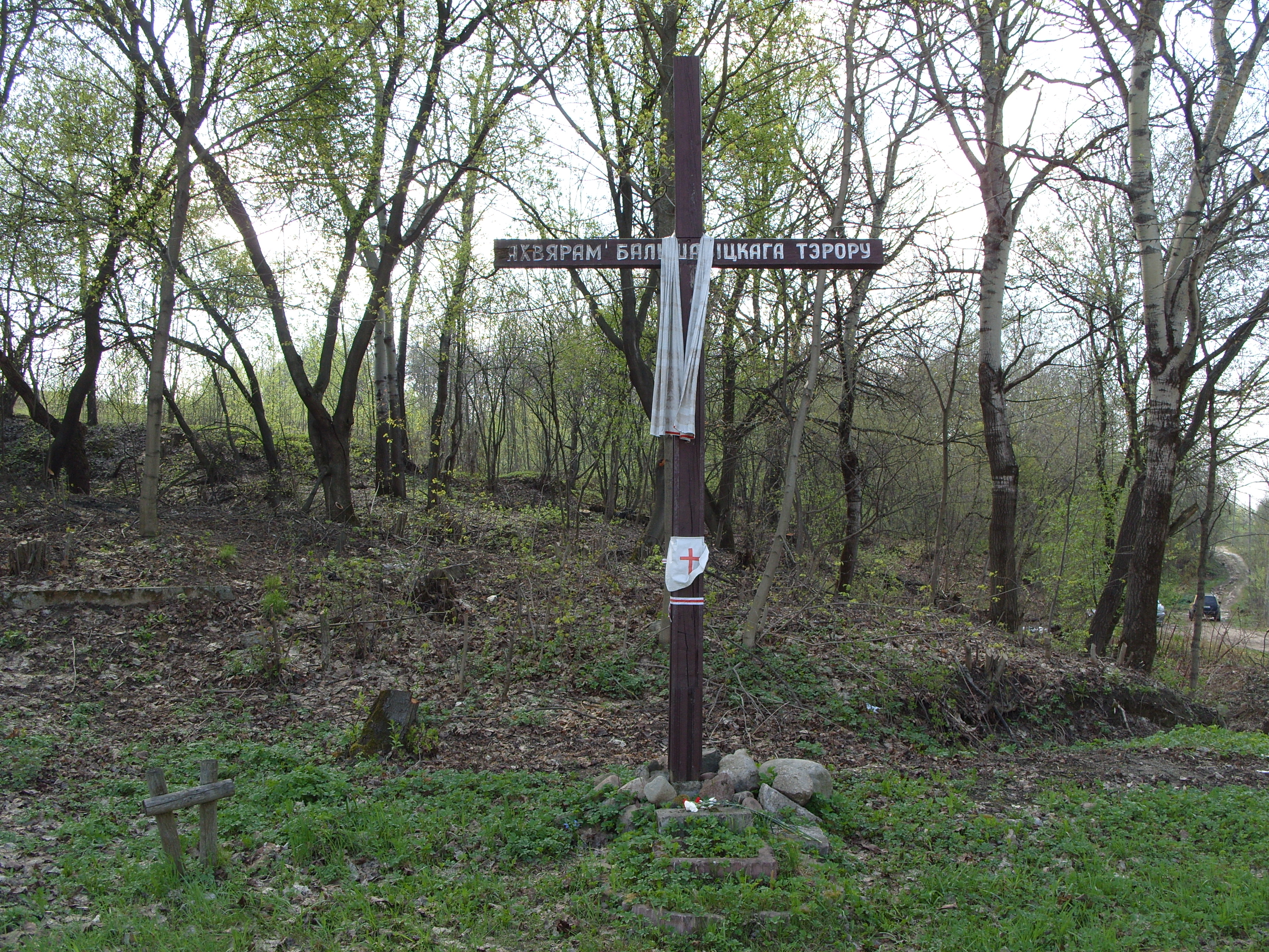 Беларуская (тарашкевіца): Крыж ахвярам сталінскіх рэпрэсіяў у лошыцкім яры